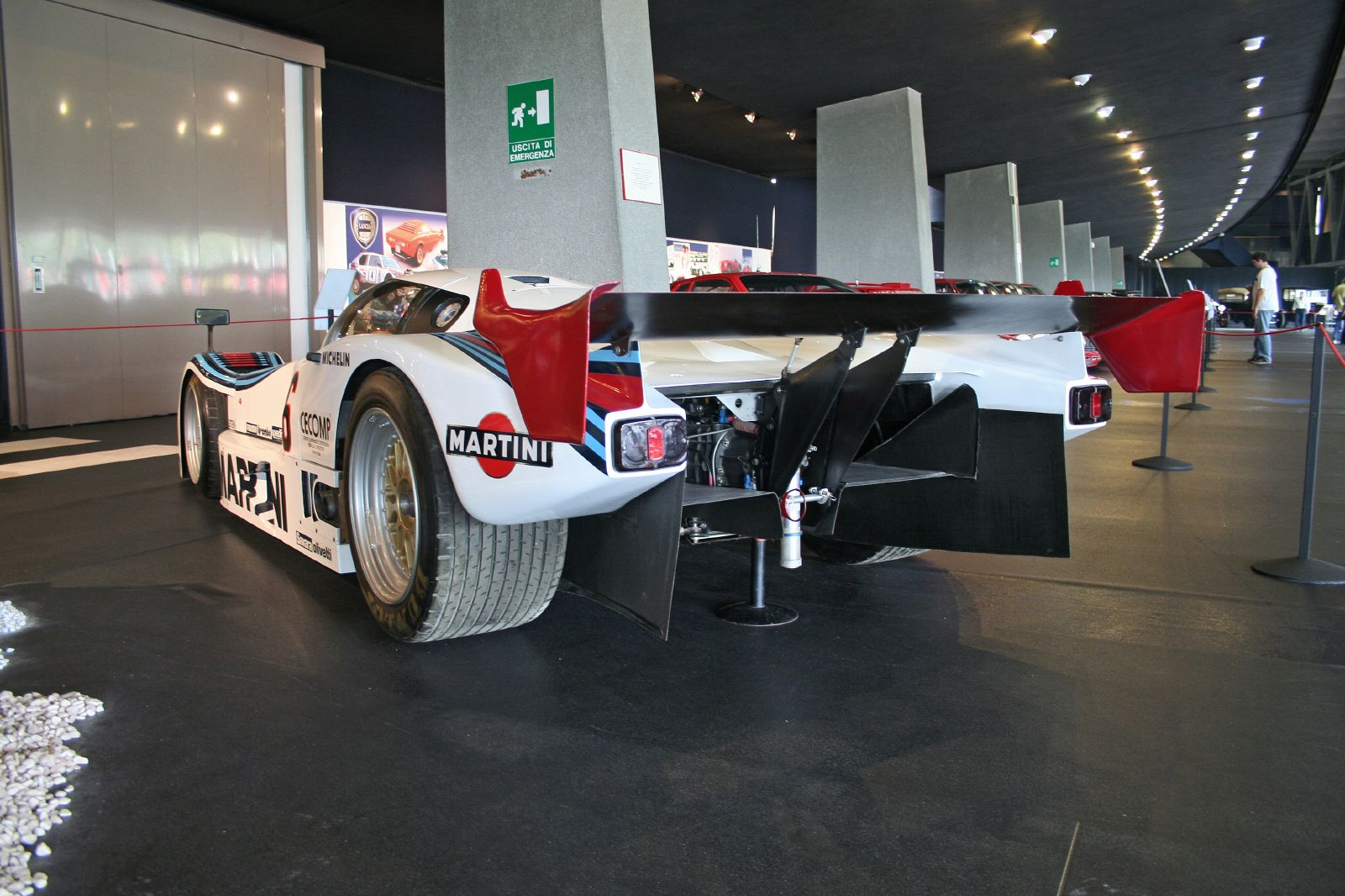 A Lancia LC2